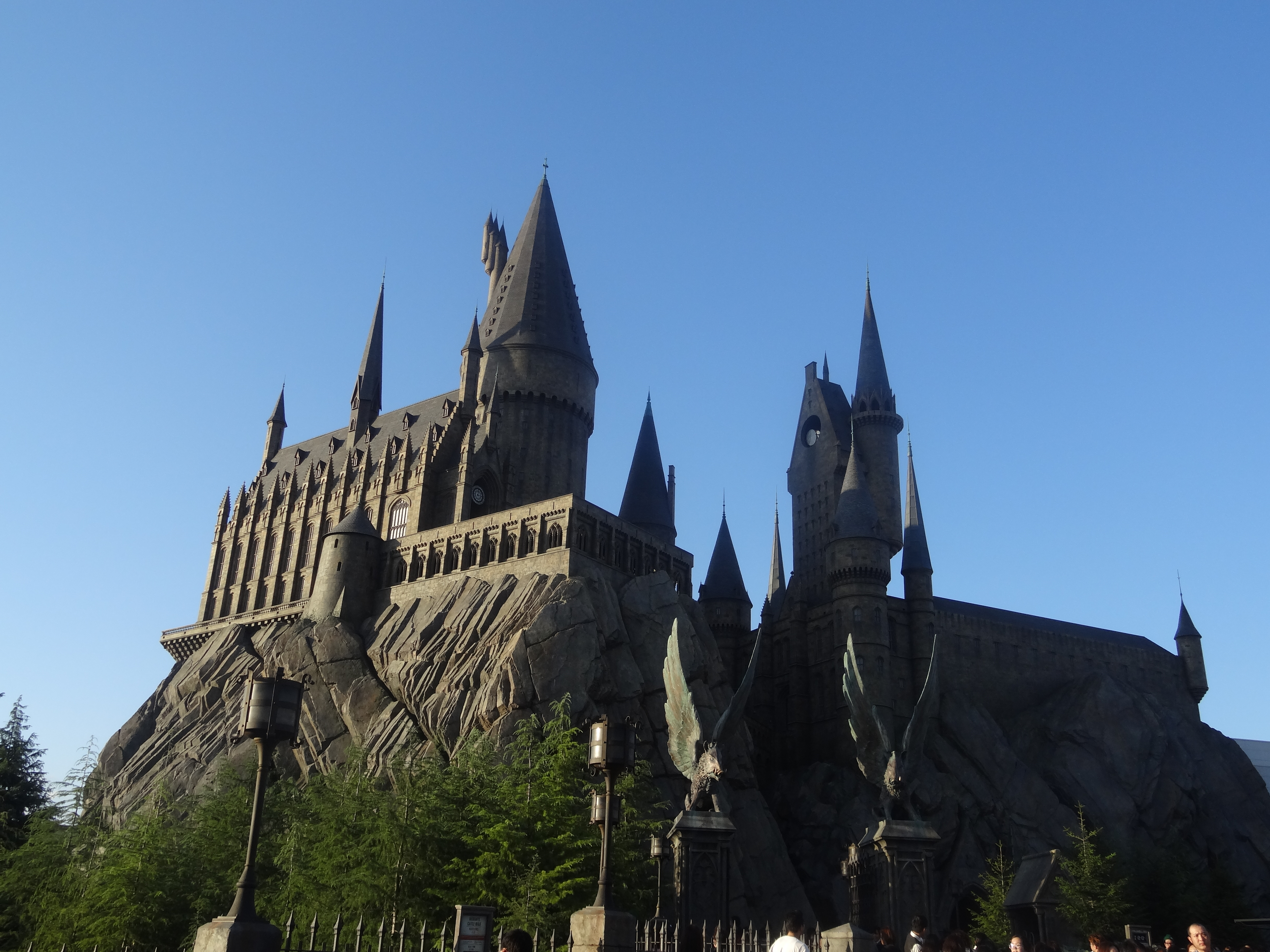 Château de Poudlard à Universal Studios Japan